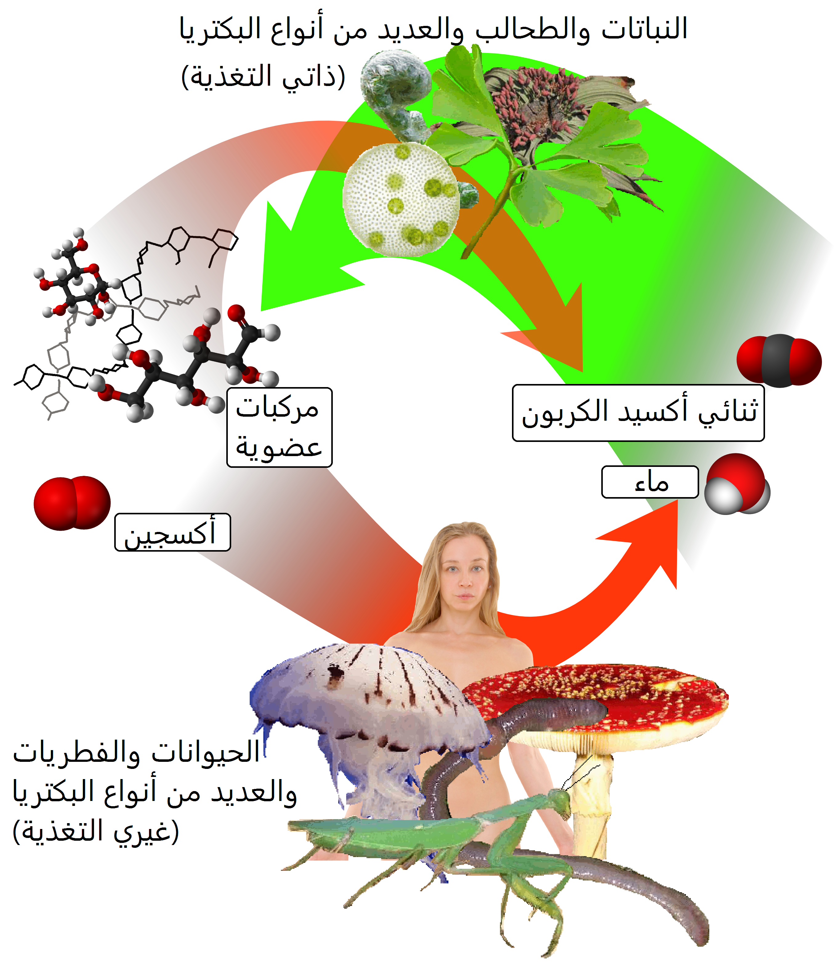 الدورة بين الكائنات ذاتية التغذية وغيرية التغذية